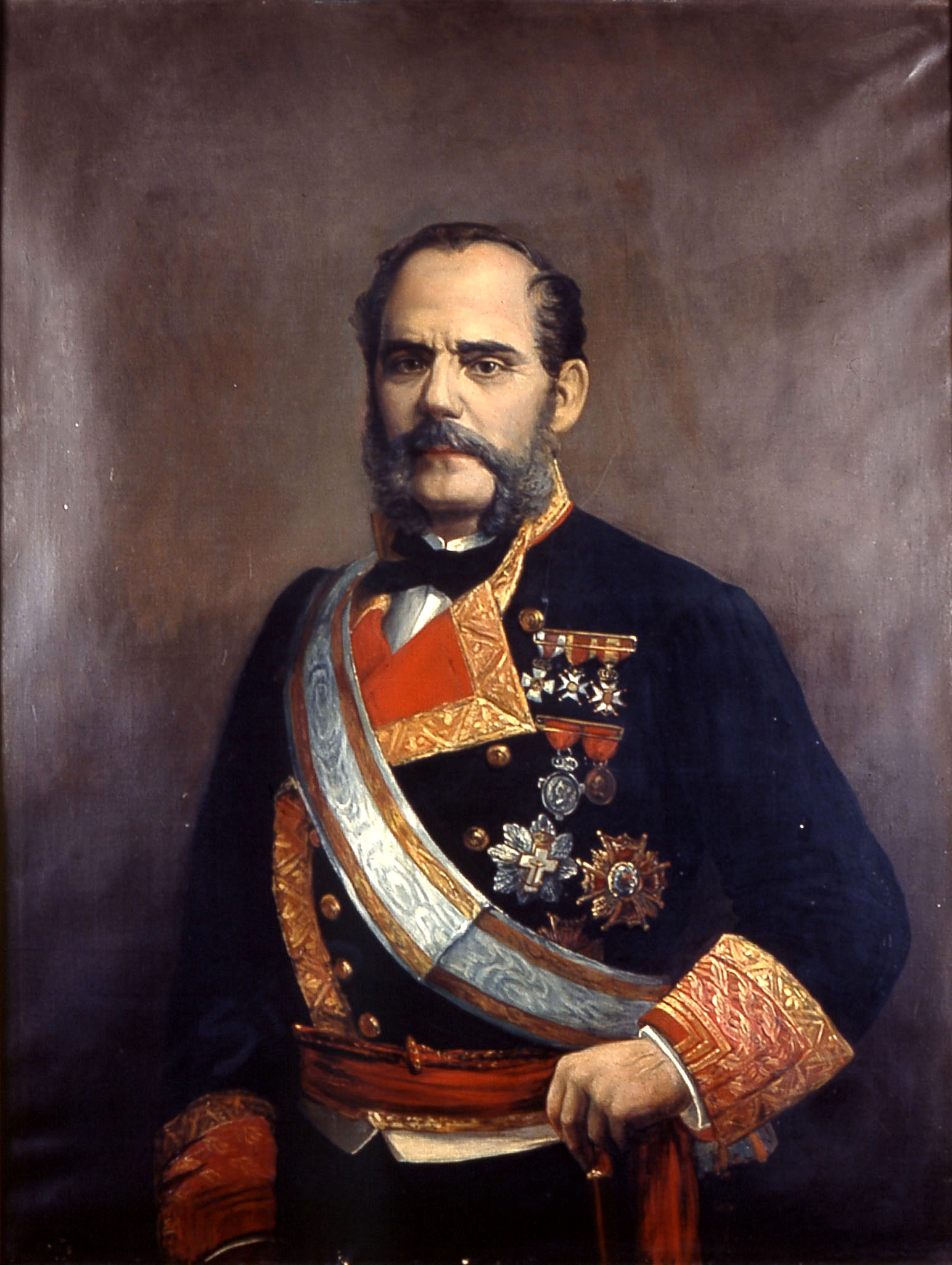 Retrato del marino y político español Juan Bautista Topete y Carballo (1821-1885), que llegó a ser vicealmirante de la Real Armada Española y también comendador de la Orden de Carlos III y caballero gran cruz de la Orden de San Hermenegildo.